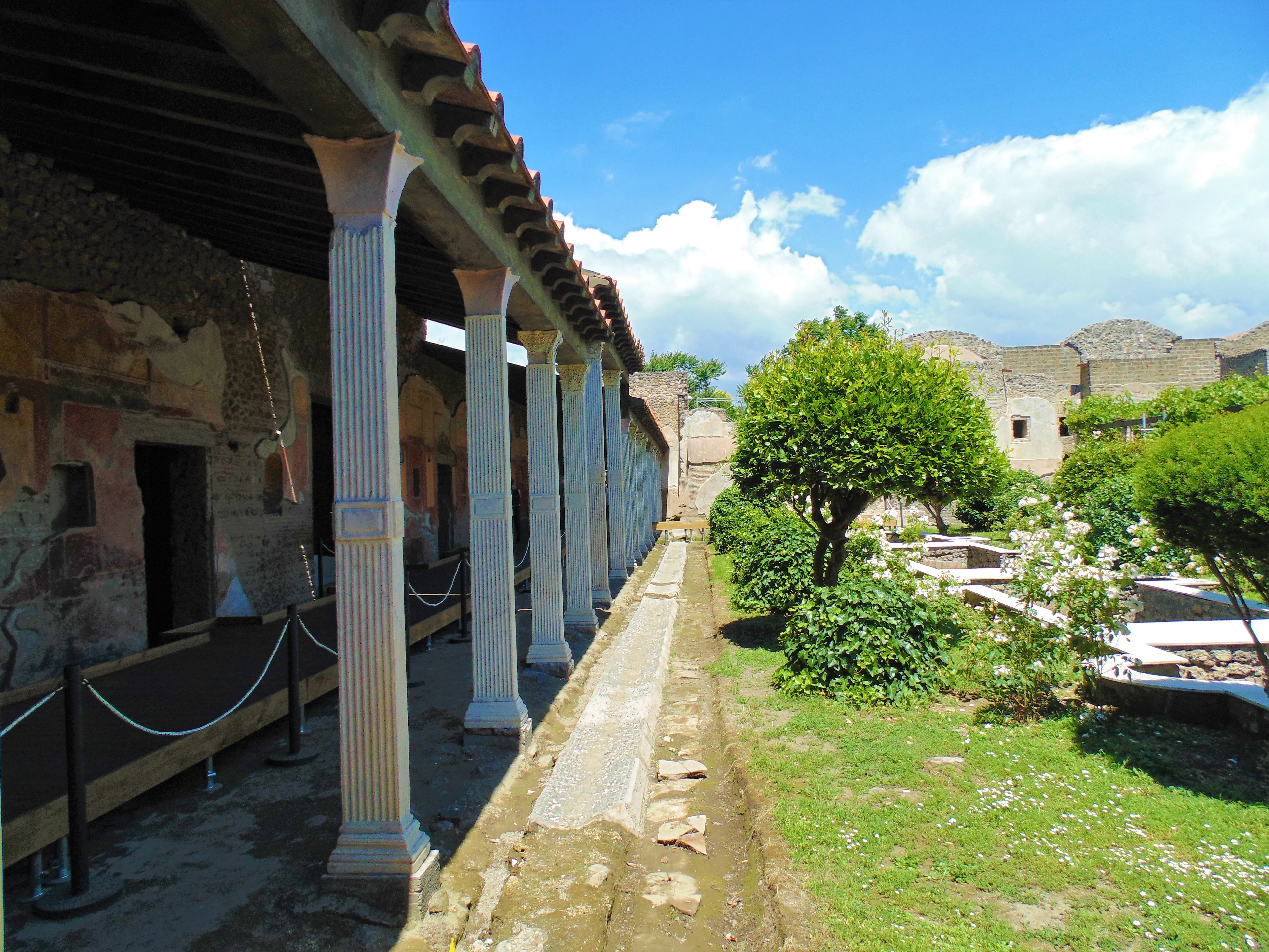 Villa di Giulia Felice This is a photo of a monument which is part of cultural heritage of Italy.